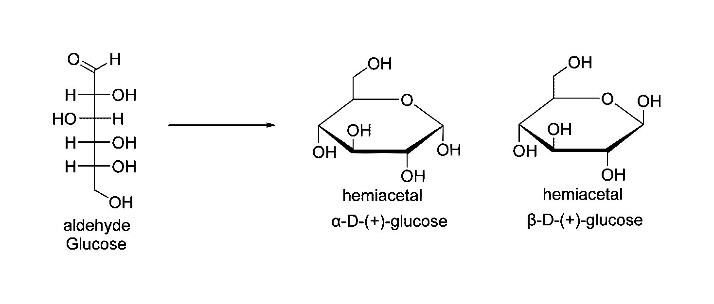 葡萄糖半缩醛